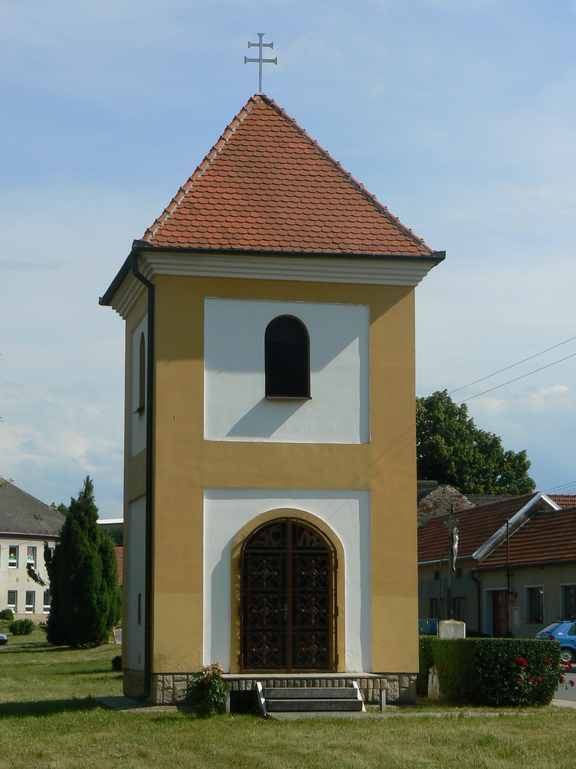 Kaple sv. Cyrila a Metoděje v Mouchnicích